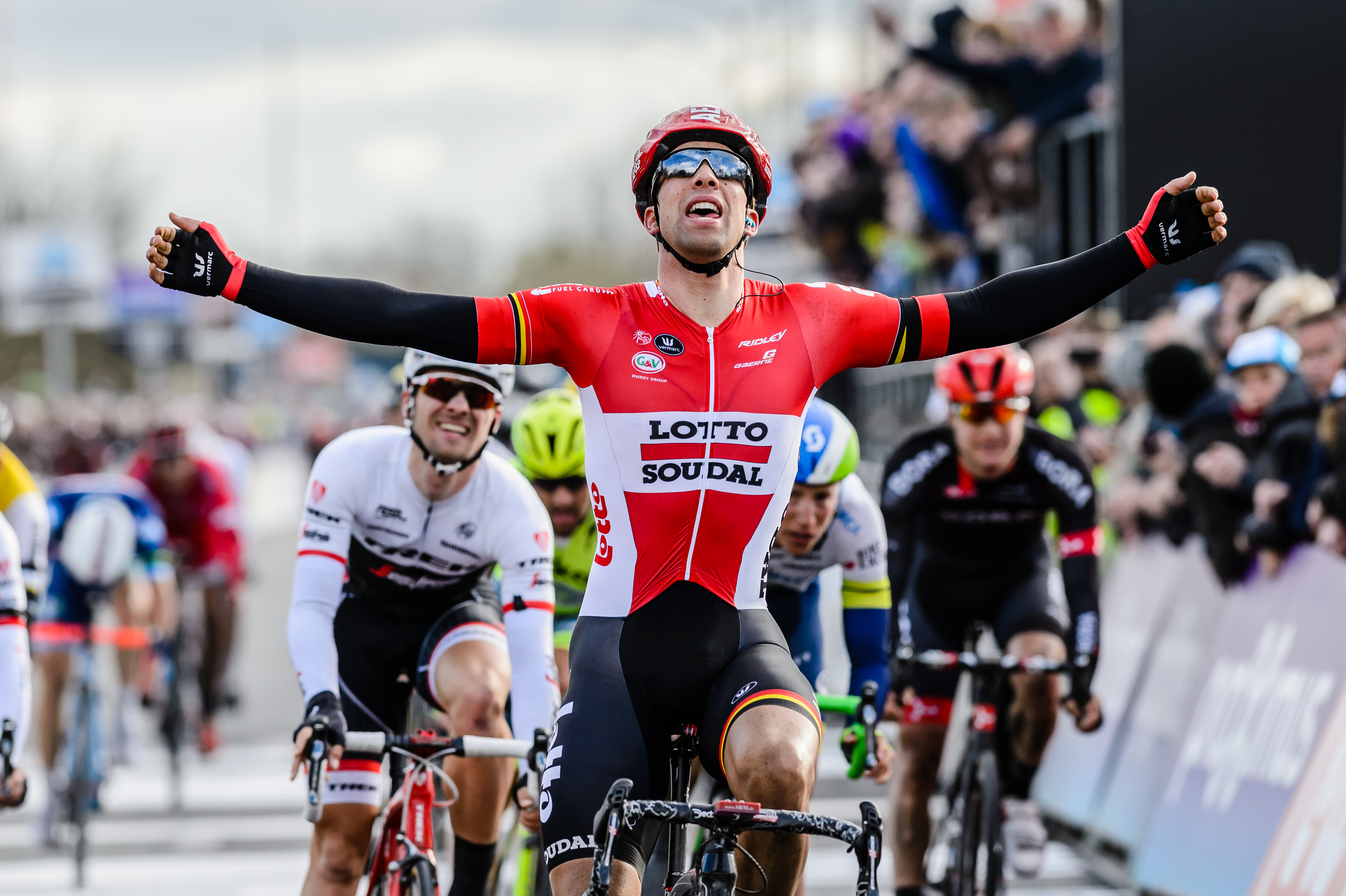 In Waregem ziet Greg Van Avermaet zijn solovlucht stranden op 250 meter voor de finish. Hij wordt geremonteerd door het peleton, waar Bryan Coquard iets te vroeg zeker is van de zege. Op de streep wordt de Fransman in extremis nog gepasseerd door Jens Debusschere. Edward Theuns eindigt als derde.